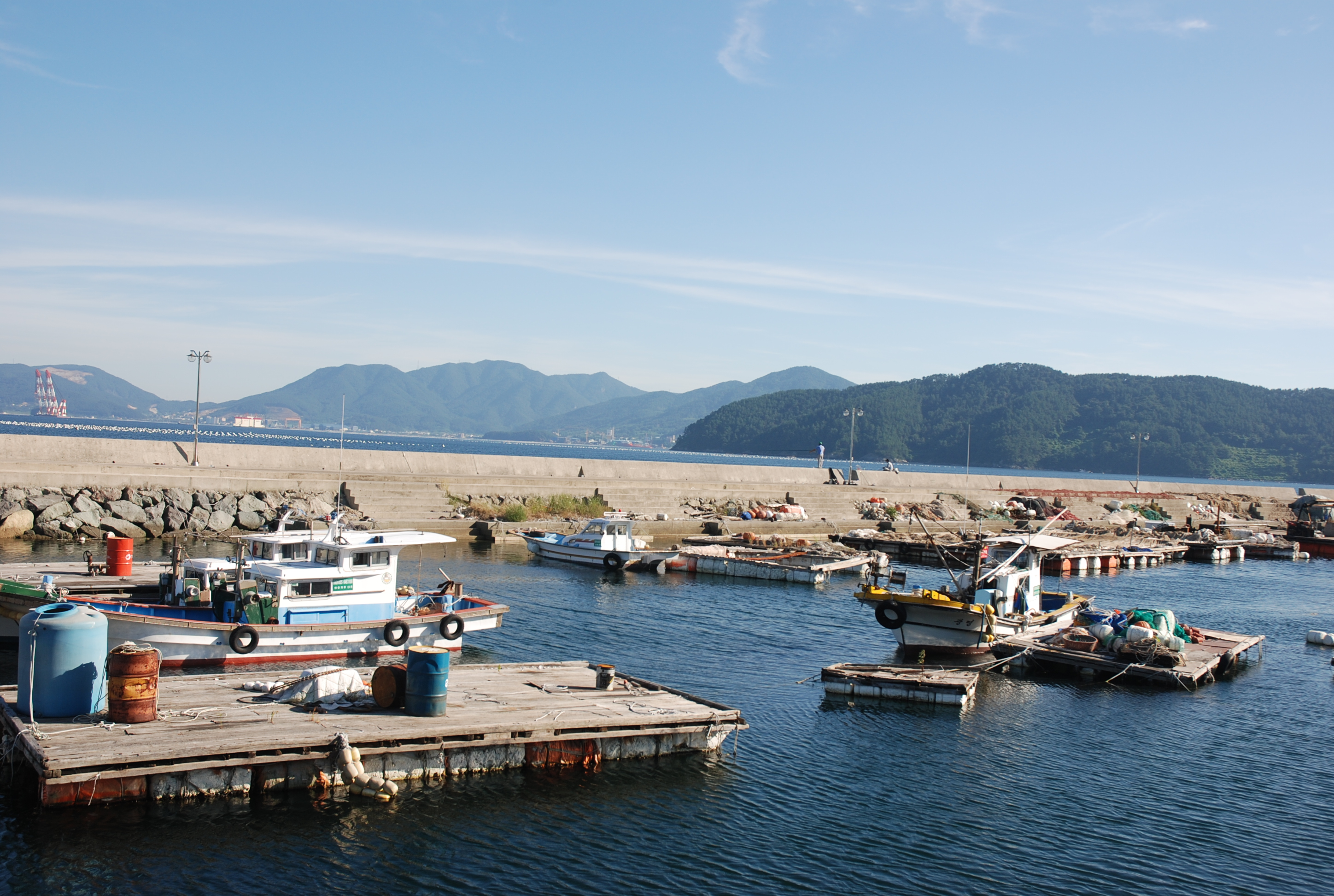 유교항과 유교마을